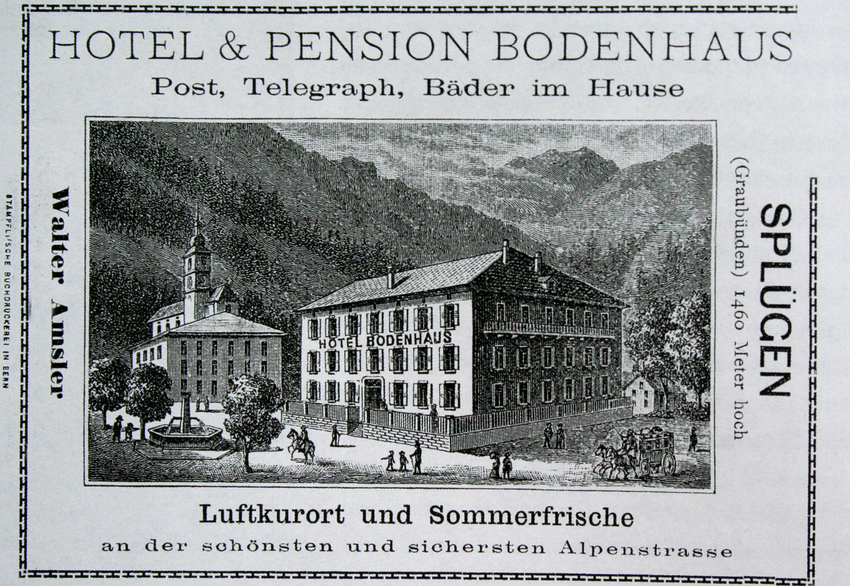 Hotel Bodenhaus in Splügen Werbebroschüre um 1880